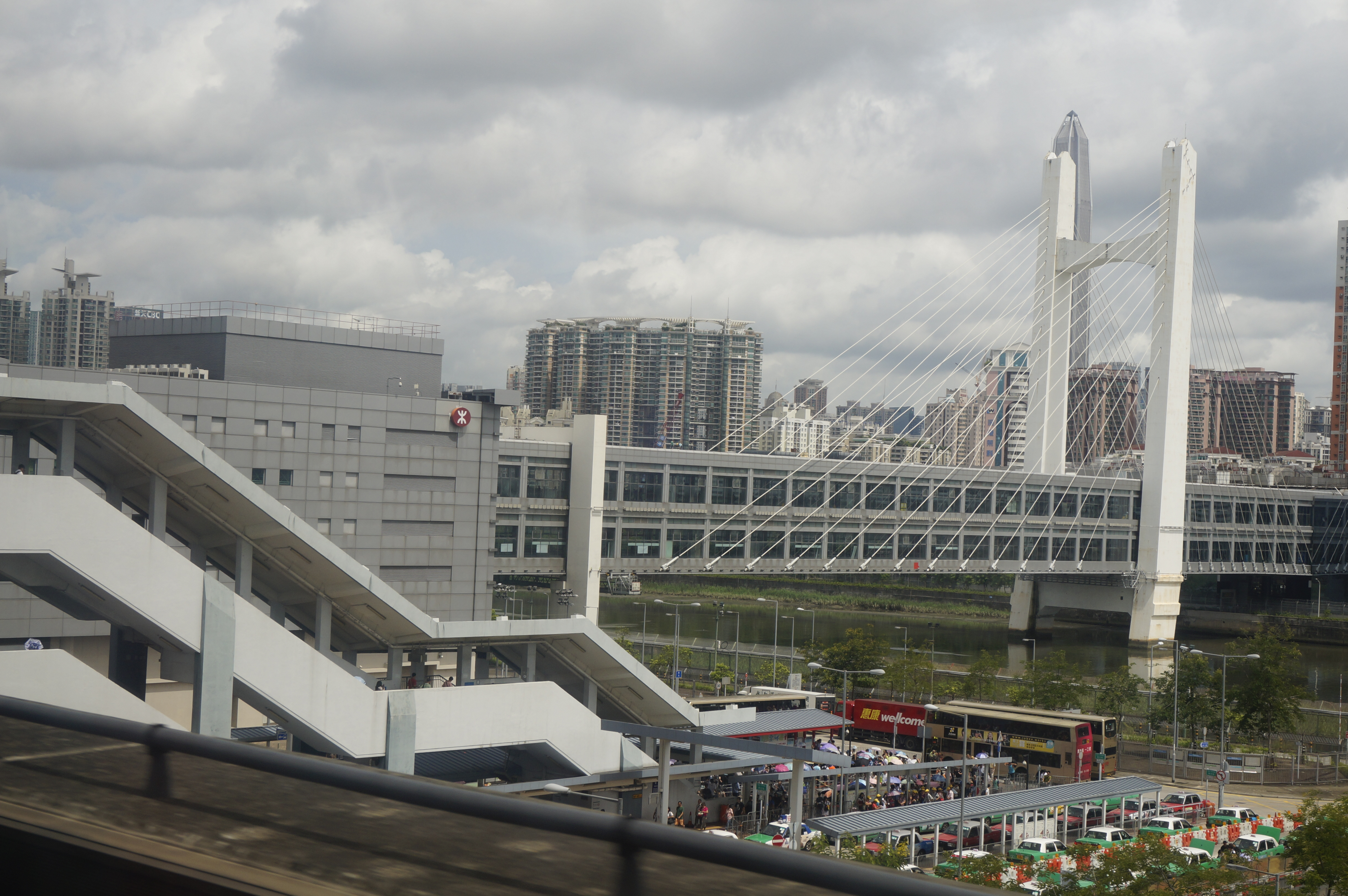 港鐵落馬洲站外貌